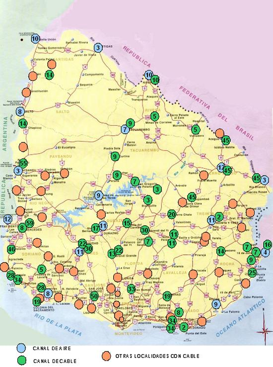 cobertura de la red tv color, a 2011